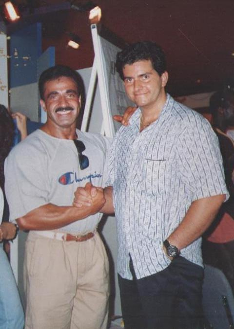 23-9-1990, Paolo Tassetto con Samir Bannout, Mr. Olympia 1983